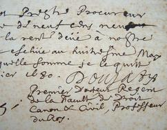 Lettre autographe de l'académicien Jean Doujat au sujet de sa rétribution par le Collège de France (25 janvier 1680)